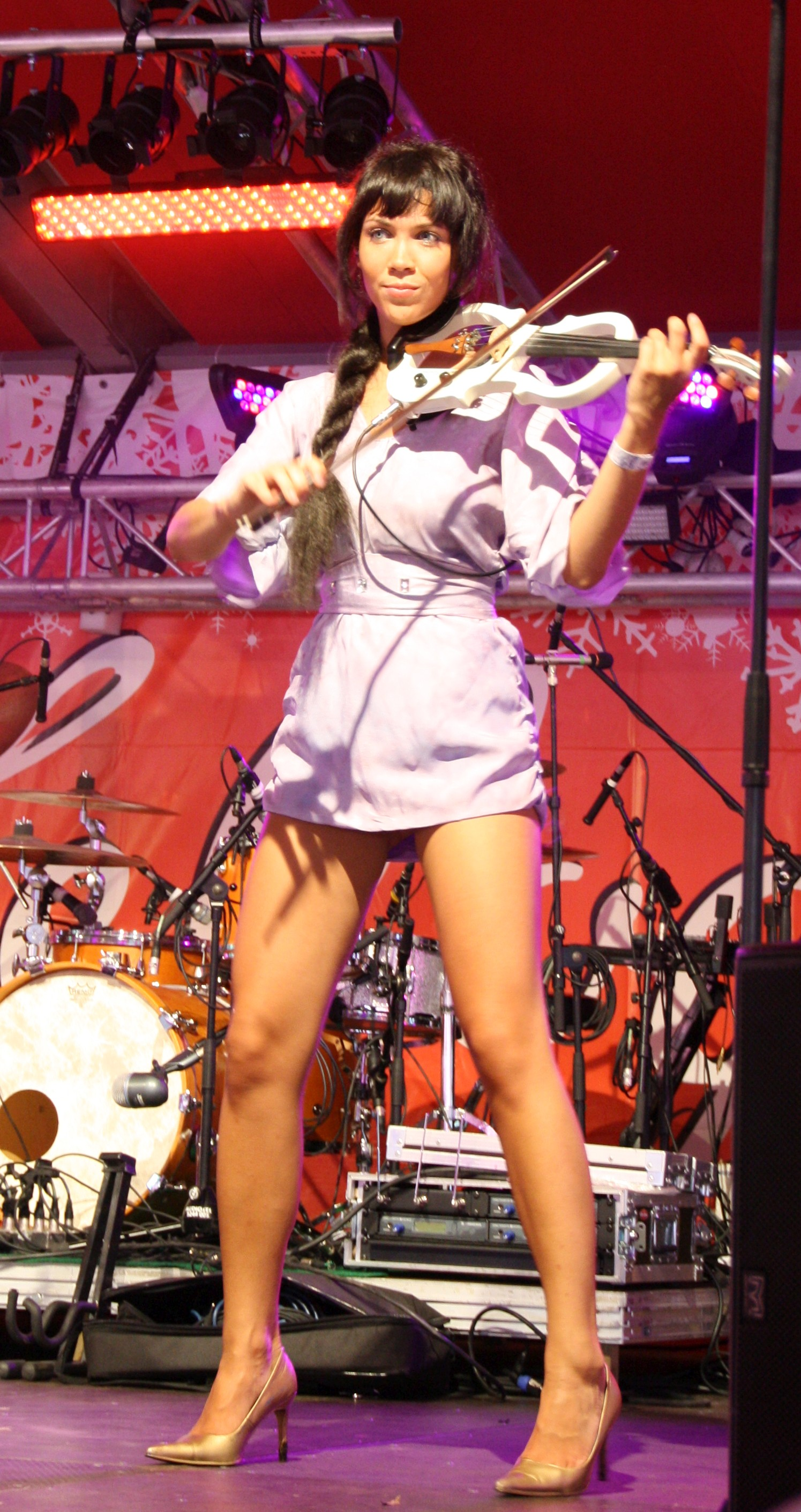 Käll Haarde ansambli esinemas Violina koosseisus Tallinna Lauluväljakul Õllesummeril